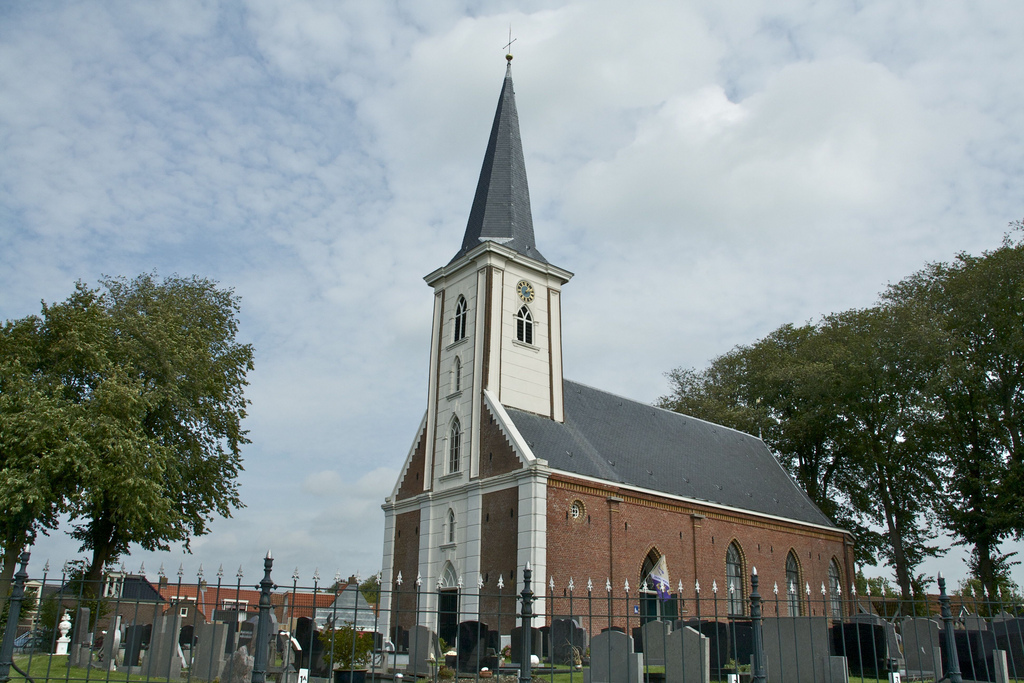 Hervormde kerk, Britsum